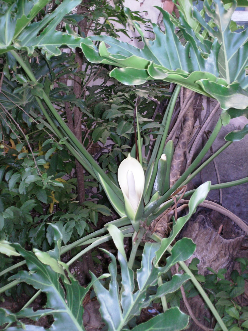 Imbé (Philodendron) florido, em meu quintal.